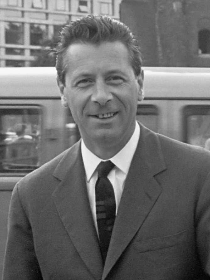 Pierre Dominique Gaisseau met vrouw op Munt 3 juli 1961